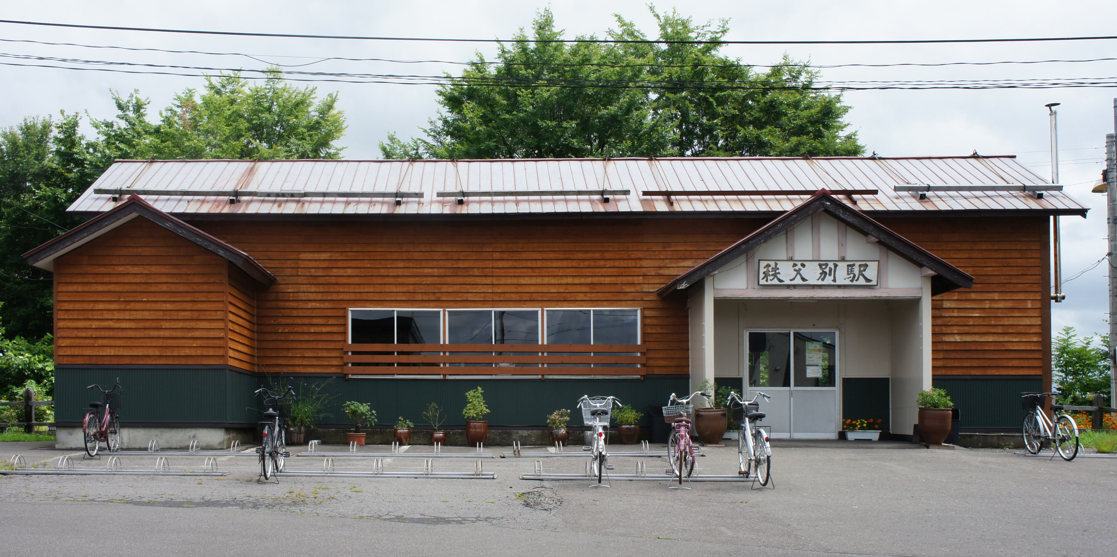 JR留萌本線・秩父別駅の駅舎